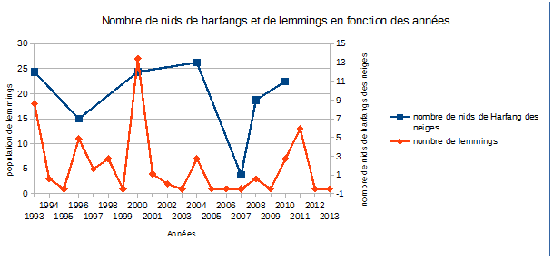 Comme ce graphique nous le montre, la population des lemmings et des harfangs des neiges est liée par l’alimentation des harfangs des neiges, et donc par la reproduction des lemmings.